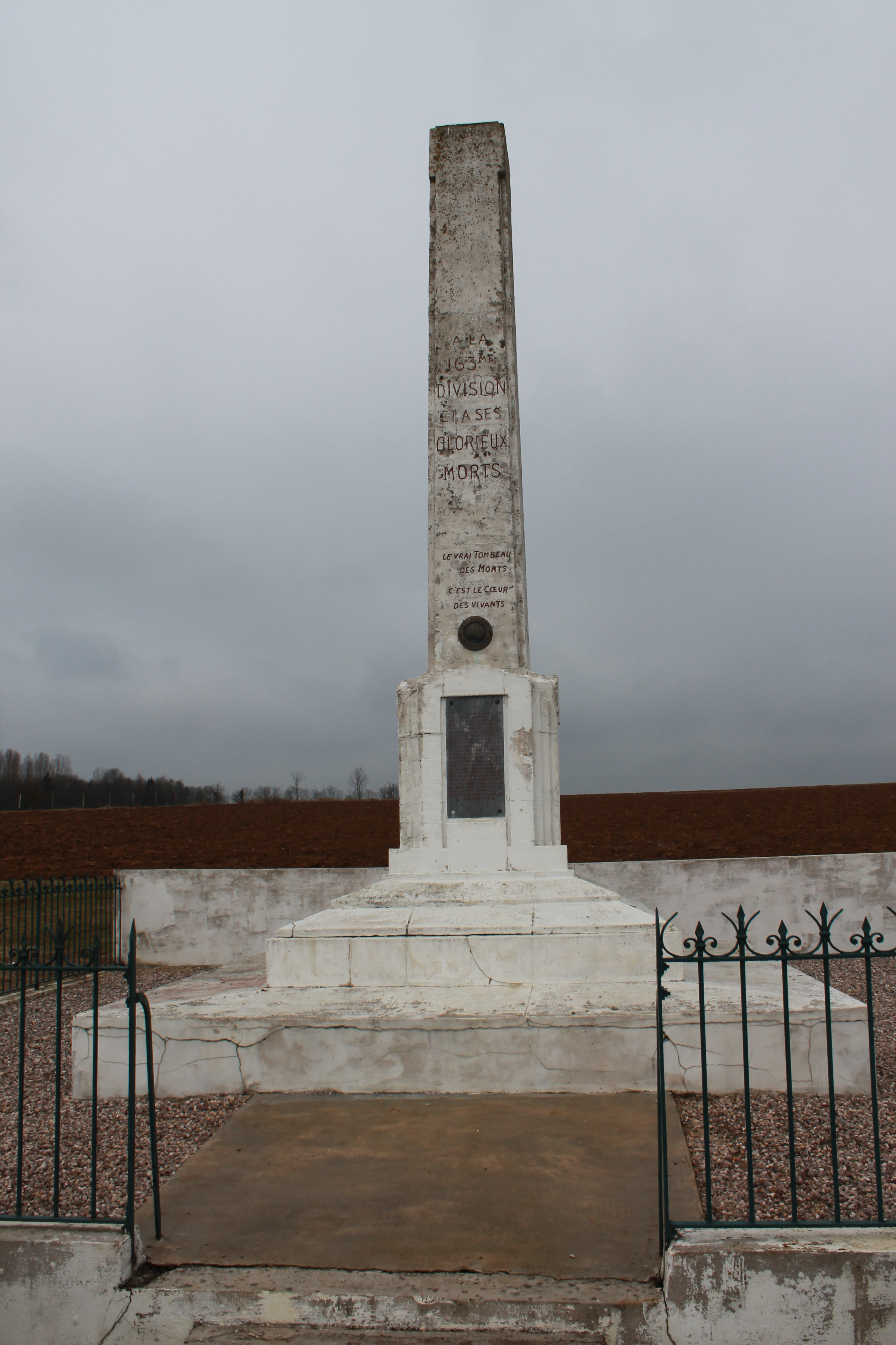 Mémorial de la 163e division d'infanterie, au lieu-dit La Côte de l'Épine, à Vrigne-Meuse. Il a été édifié sur les lieux de la dernière offensive de la première Guerre Mondiale.